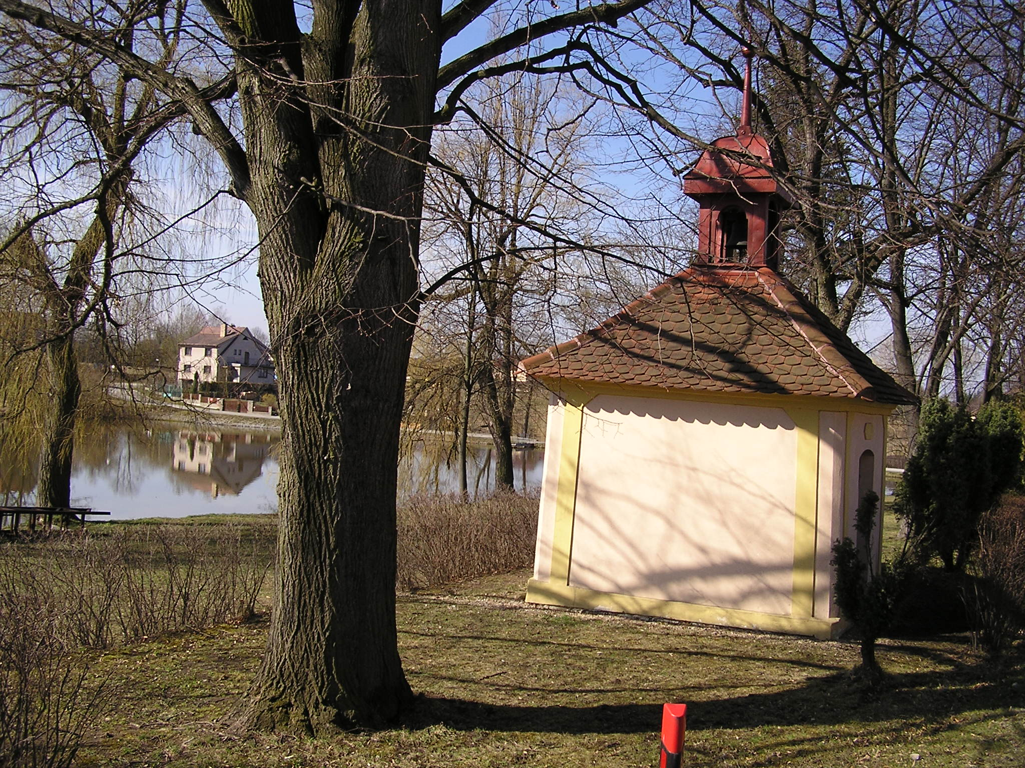 Srubec